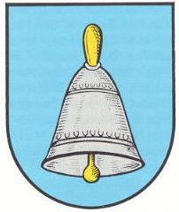 Wappen von Schellweiler